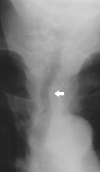 Struma - erstellt für Drahreg's Artikel in wiki (Struma)